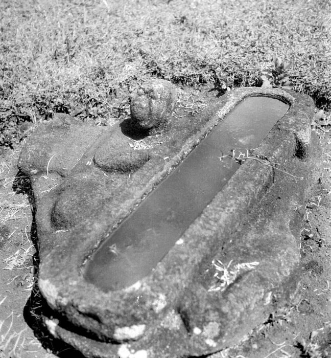 Negatif. Palungan prasejarah dengan figur manusia di Dataran Tinggi Besemah